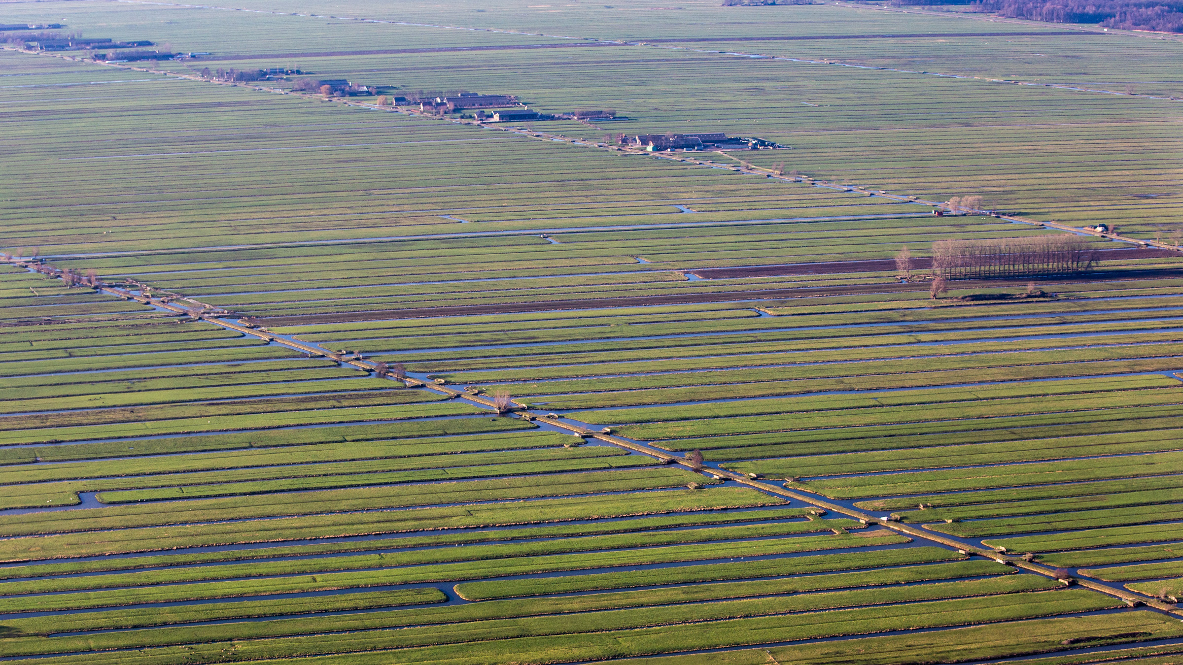 Polder den Hoek ten oosten van Lekkerkerk